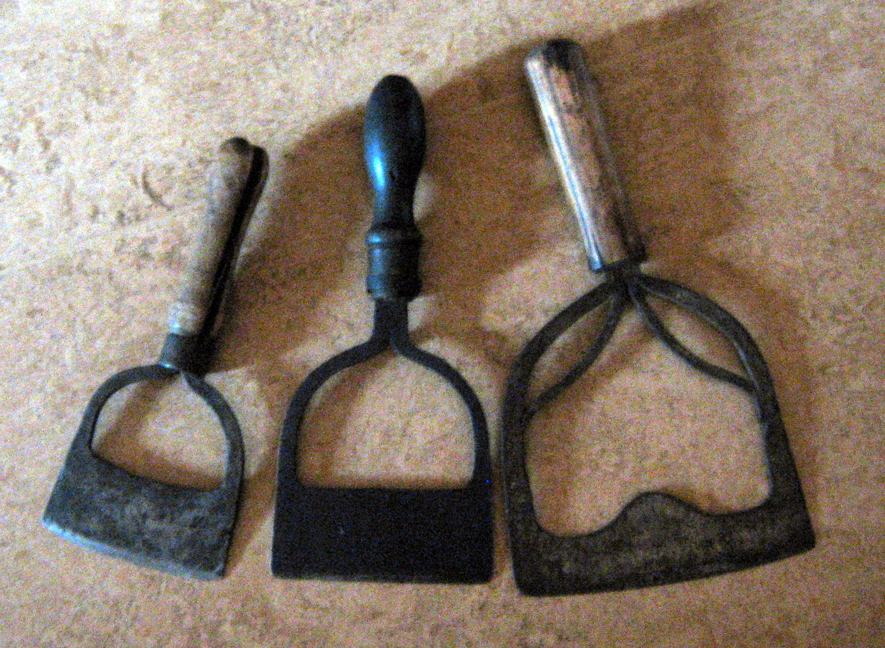 Kötthackar